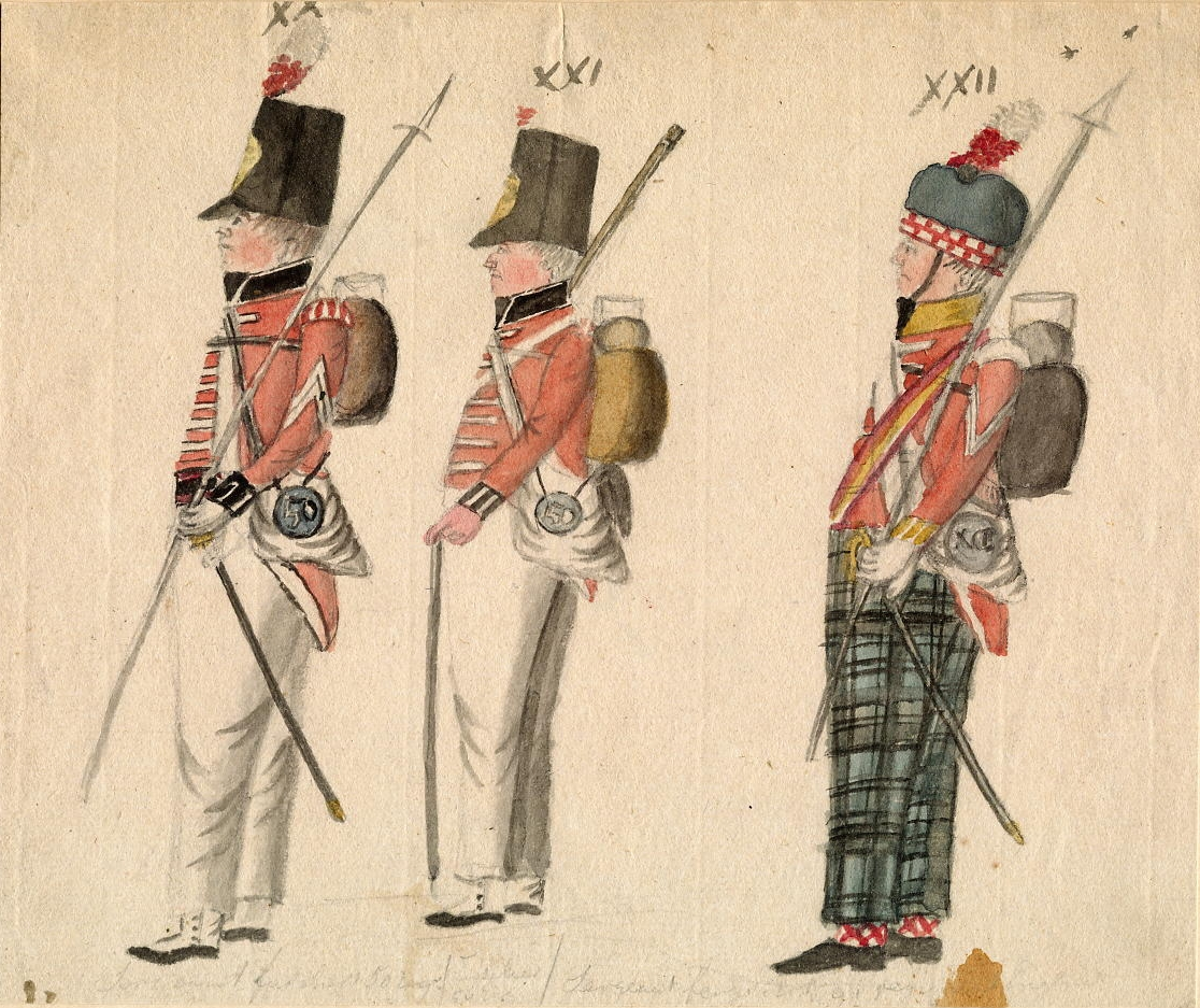 Engelse soldaten in Walcheren 1809 van het 50ste en 91ste Regiment Infanterie.